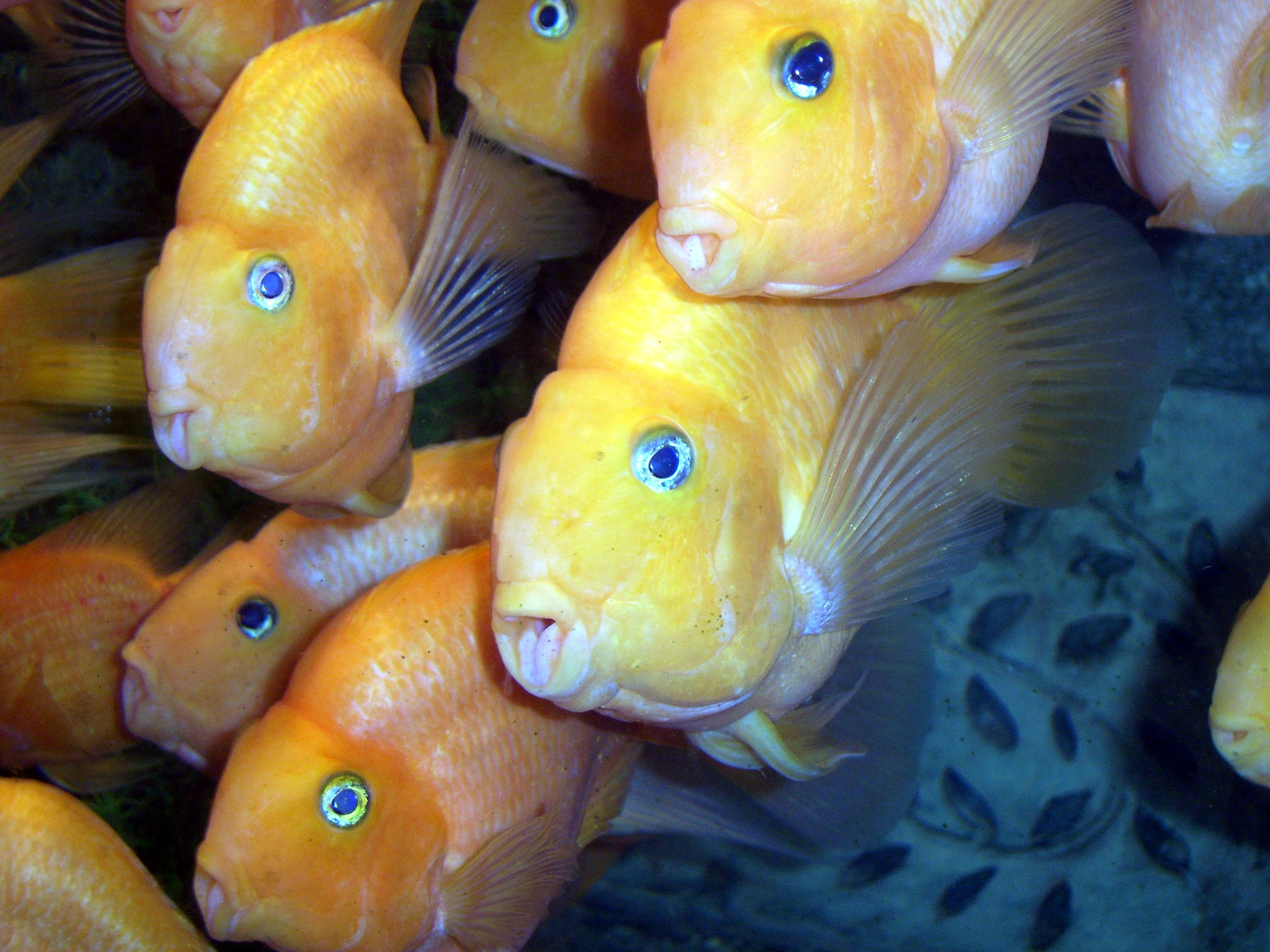 血鹦鹉 Cichlasoma citrinellum XC.synspilum